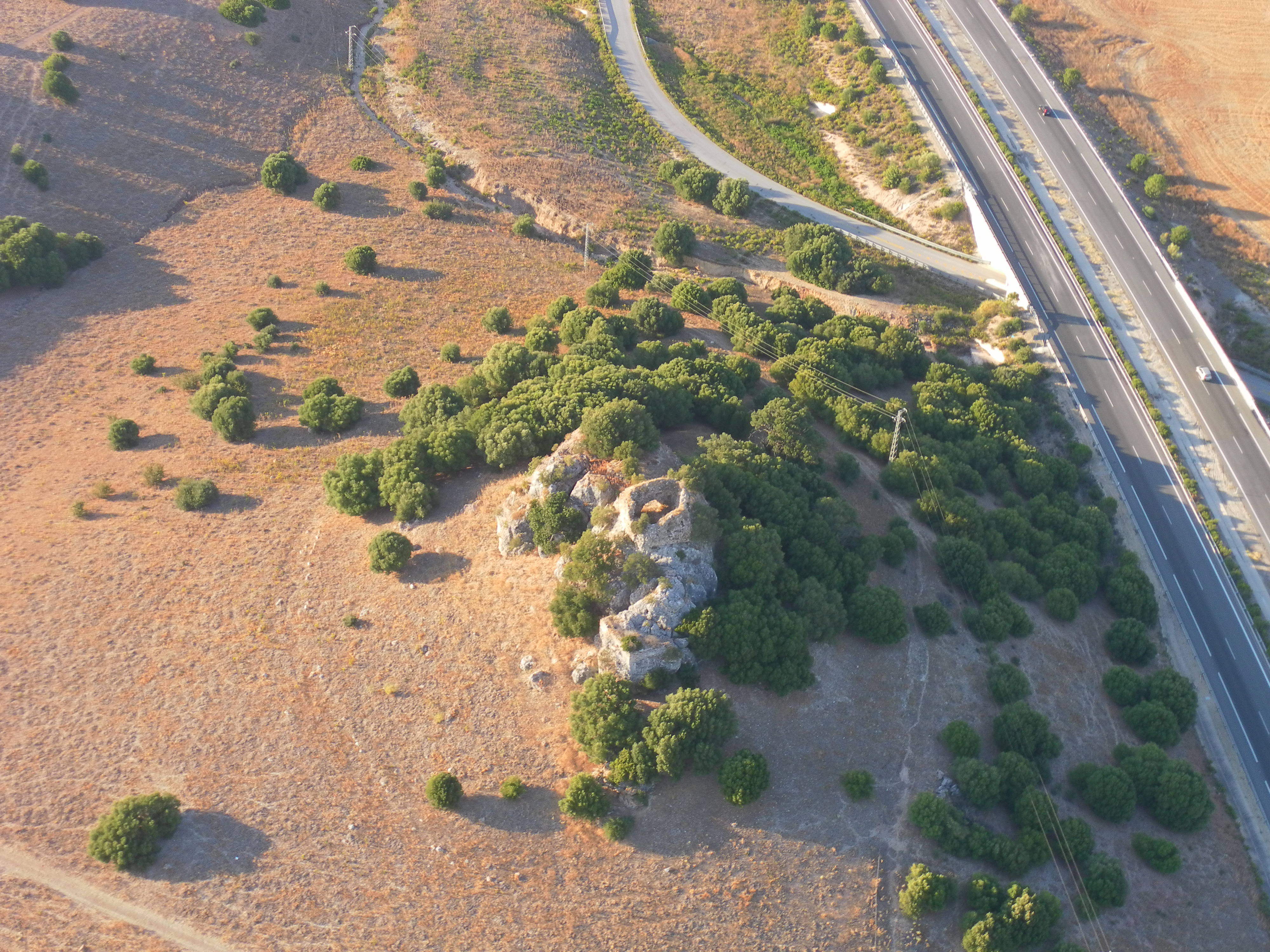 castillo berroquejo desde el aire